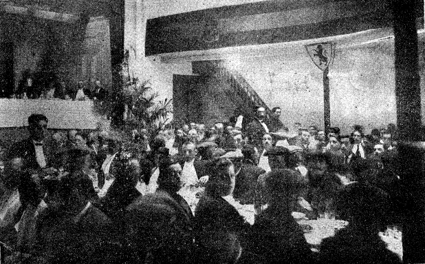 Festa de l'homenatge al Sr. Roma a Manresa. Vista d'una part del saló teatre on hi estaven congregats 231 comensals.